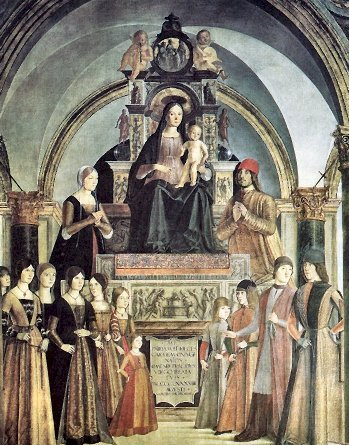 Immagini dei Bentivoglio // La famiglia Bentivoglio nell'affresco di Lorenzo Costa ( Bologna, Chiesa di San Giacomo, Cappella Bentivoglio) 1. Ginevra Bentivoglio 2. Giovanni II 3. Camilla 4 . Eleonora 5 . Isotta 6 . Laura 7 . Violante 8. Francesca 9 . Bianca 10. Annibale 11. Antongaleazzo 12. Alessandro 13. Ermes Giovanni e Ginevra ebbero 16 figli. Di essi, cinque morirono in tenera età. Tra quelli ritratti nell'affresco, ricordiamo che Camilla e Isotta furono monache nel convento del Corpus Domini. Francesca, sposata a Galeotto Manfredi, all'epoca in cui venne realizzato l'affresco (agosto 1488) aveva da appena qualche mese assassinato il marito. Quanto ai figli maschi, Ermes, che nell'88 era ancora un bambino, sarà descritto da un cronista bolognese come iracondo e perverso, addirittura "bestiale", forse in riferimento alla strage da lui compiuta, nel 1501, ai danni della famiglia Marescotti. Antongaleazzo, ritratto in abito da prelato, aveva il titolo di protonotario apostolico. Egli, come del resto l'intera famiglia Bentivoglio, avrebbe desiderato ottenere il cappello cardinalizio, onore che il papa gli rifiutò. Annibale infine, con quella mano sul fianco e la splendida veste, appare in atteggiamento fiero e sicuro di sé (al contrario il padre è in atteggiamento stranamente timido e incerto). All'epoca dell'affresco del Costa egli si era appena sposato con Lucrezia d'Este. Dopo la morte di Giovanni II e l'esilio subito dalla sua famiglia, fu lui a tentare, insieme al fratello Ermes, di rientrare a Bologna. Tramontata però ogni speranza di riprendere in mano il governo della città, egli si trasferì stabilmente a Ferrara dove ebbe inizio la sua discendenza.